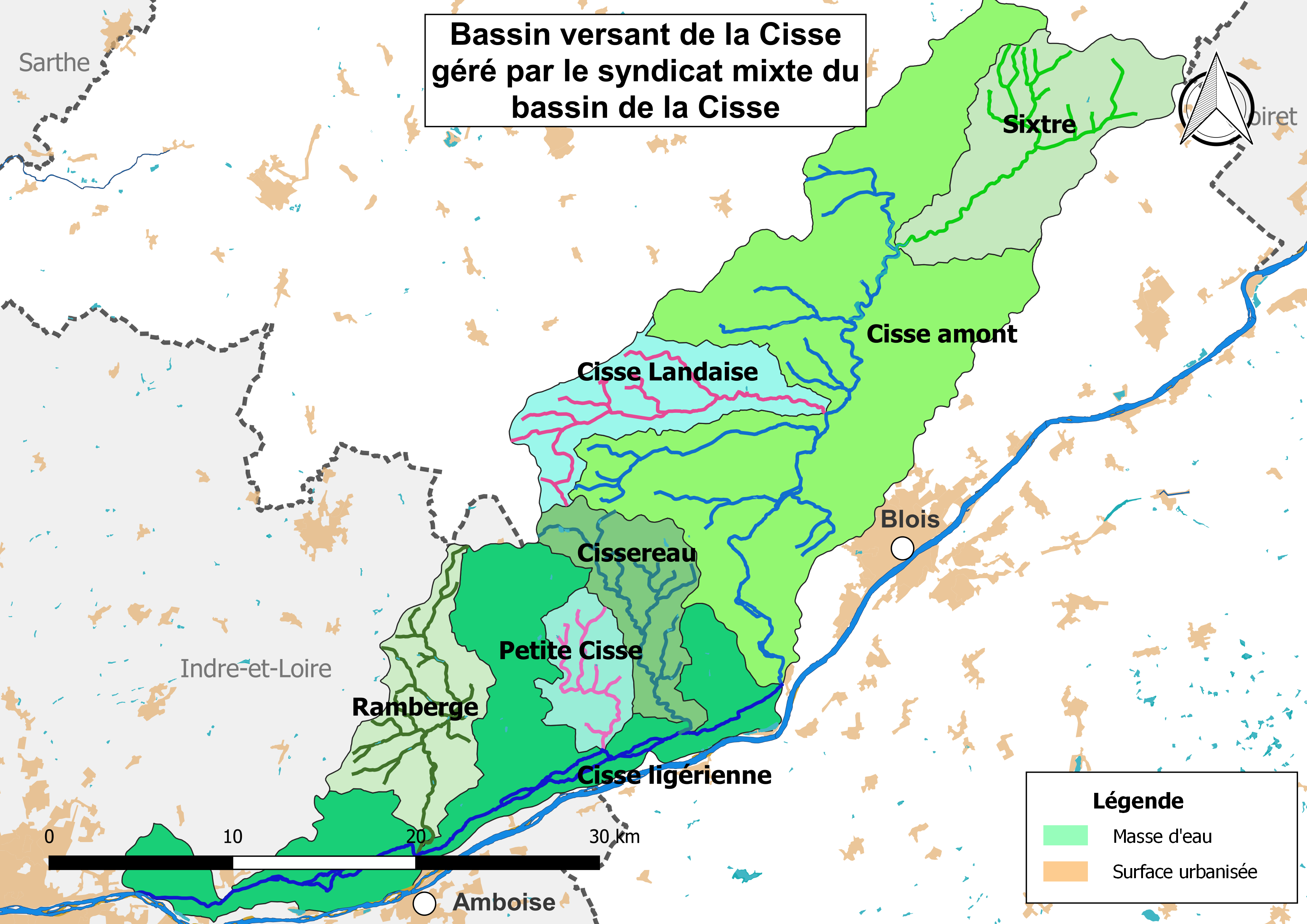 Carte du bassin versant de la Cisse géré par le syndicat mixte du bassin de la Cisse